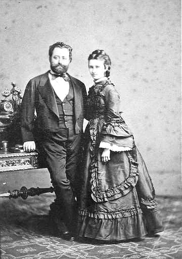 Erkel László (Buda, 1845. április 9. – Pozsony, 1896. december 3.) zongoraművész, karnagy, Erkel Ferenc fia és felesége